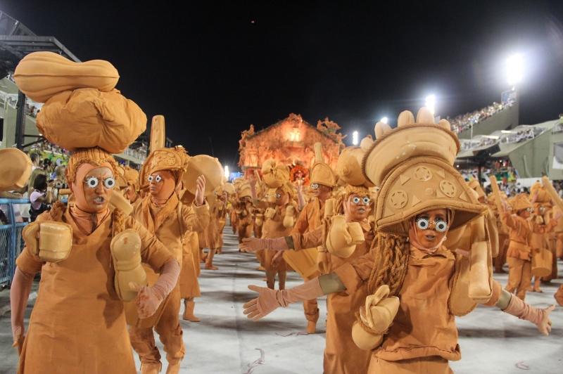 GRES Unidos da Tijuca, 2012.